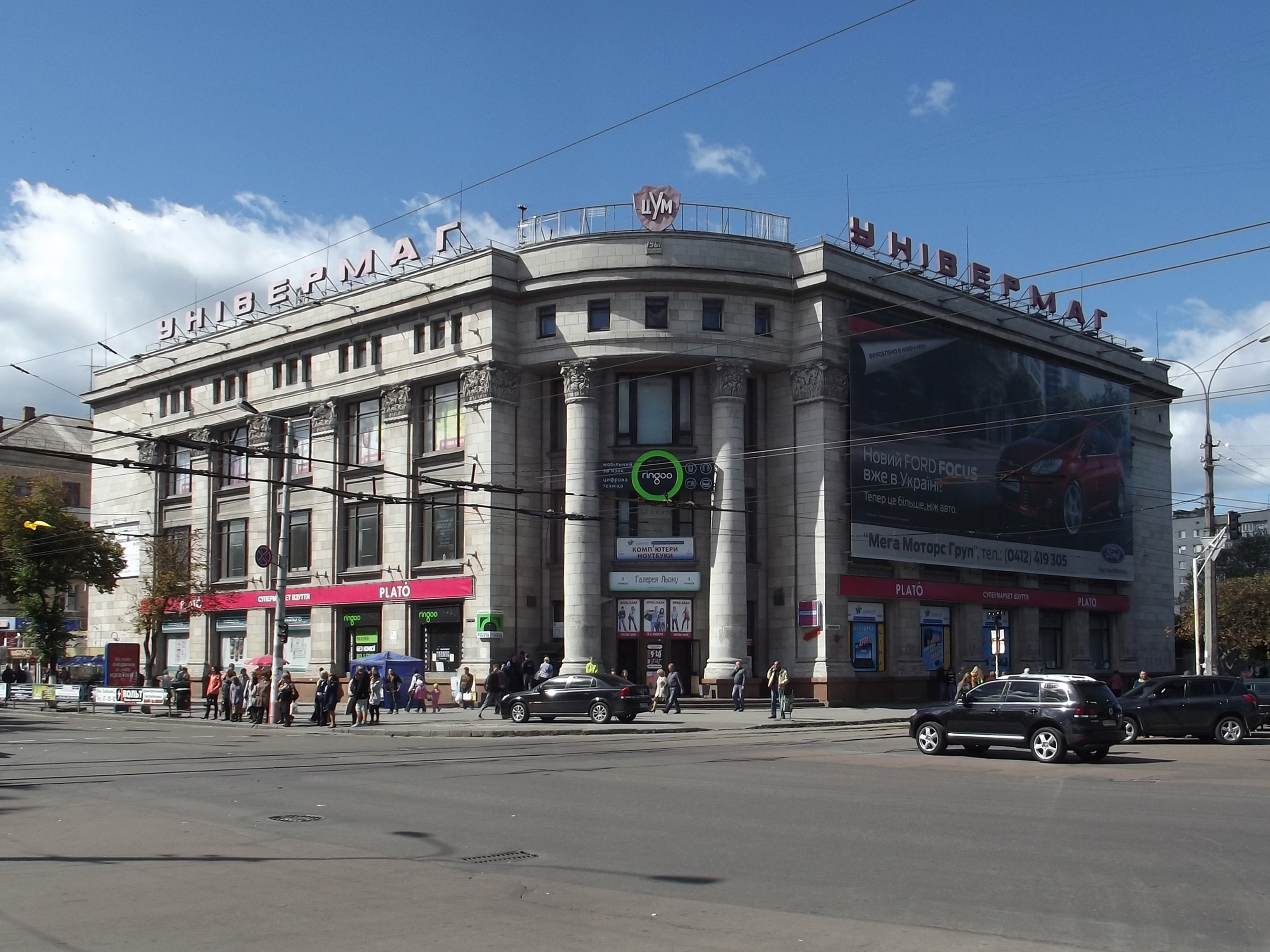 Центральный универмаг